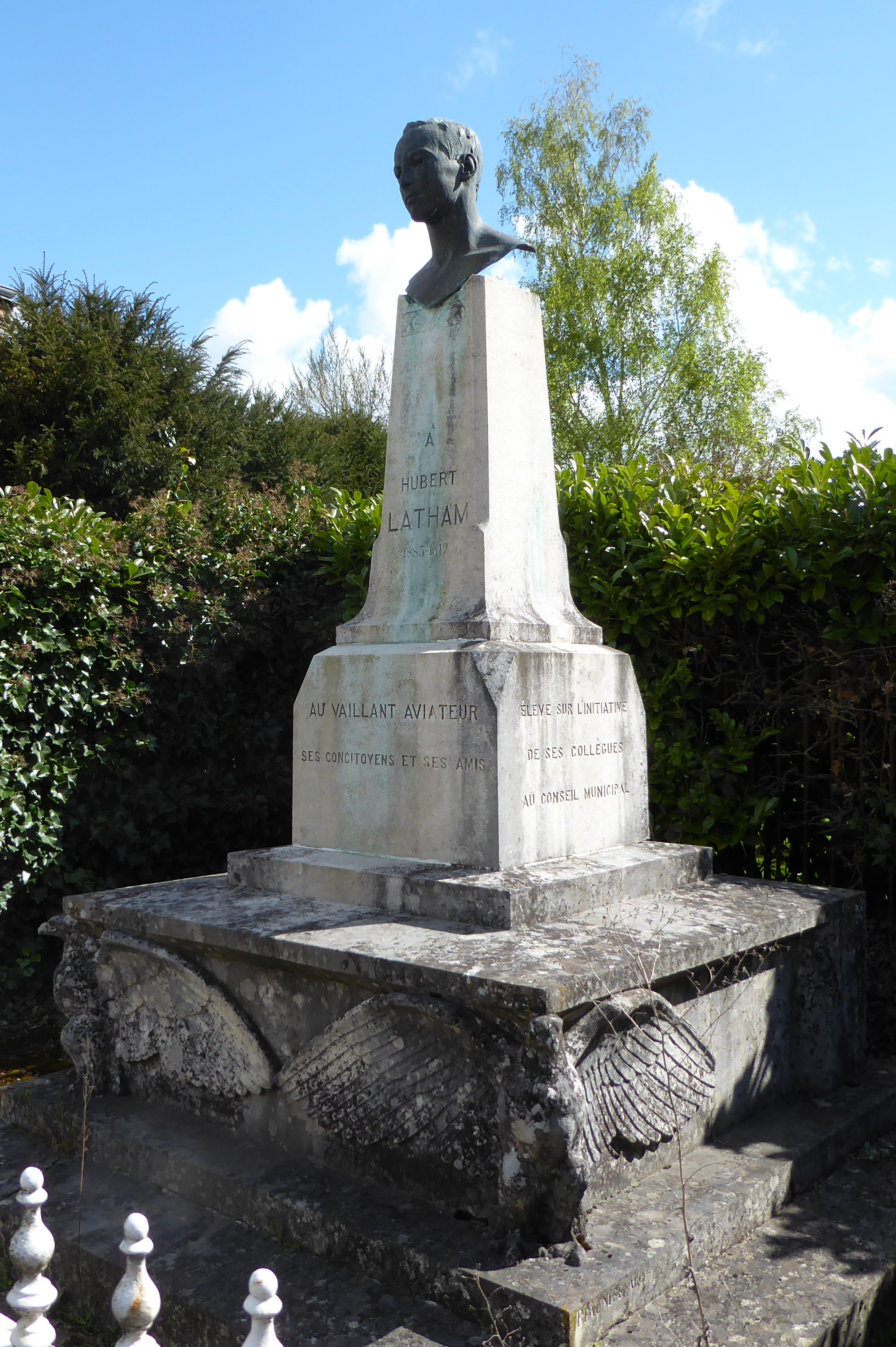 buste d'Hubert Latham, Maillebois, Eure-et-Loir (France). "A HUBERT LATHAM 1883-1912 AU VAILLANT AVIATEUR SES CONCITOYENS ET SES AMIS ÉLEVÉ SUR L'INITIATIVE DE SES COLLÈGUES AU CONSEIL MUNICIPAL"